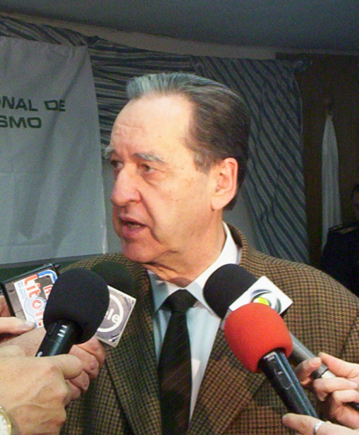 Fotografía de José Diaz, abogado y político uruguayo.